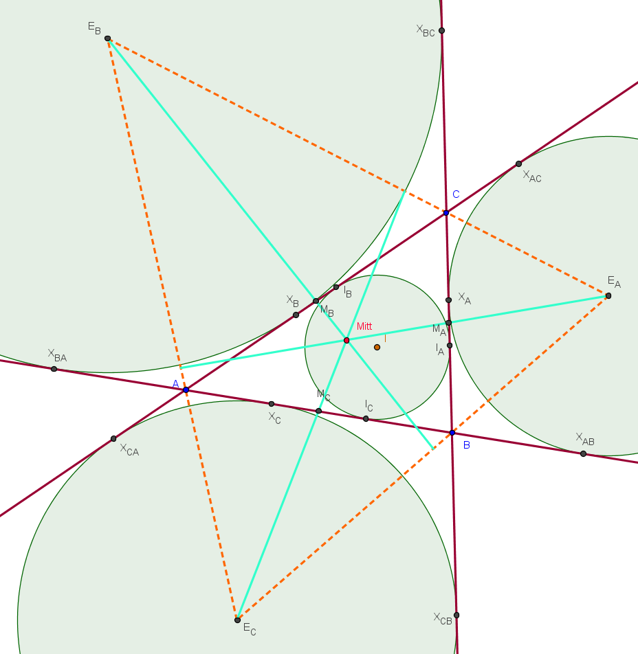 Mittpunkt